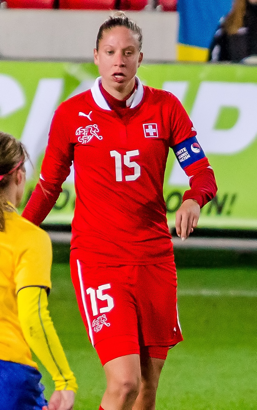 Schweiz Caroline Abbé i den första landskampen på Myresjöhus Arena (tillika Pia Sundhages debut som svensk förbundskapten) 23 oktober 2012, där Sverige slog Schweiz med 3-0 inför 4905 åskådare.